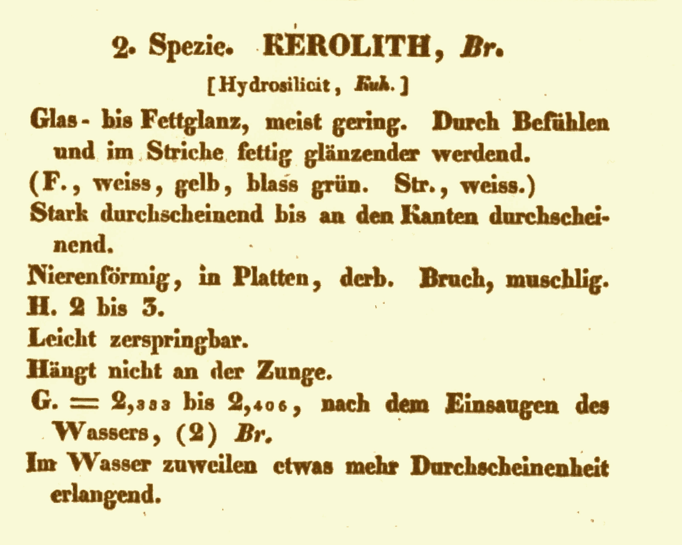 Scan der ersten vollständigen Beschreibung (nicht der Erstbeschreibung 1823) von Kerolith aus August Breithaupt:" Vollständige Charakteristik des Mineralsystems", 3 Auflage, Dresden / Leipzig 1832, S. 98